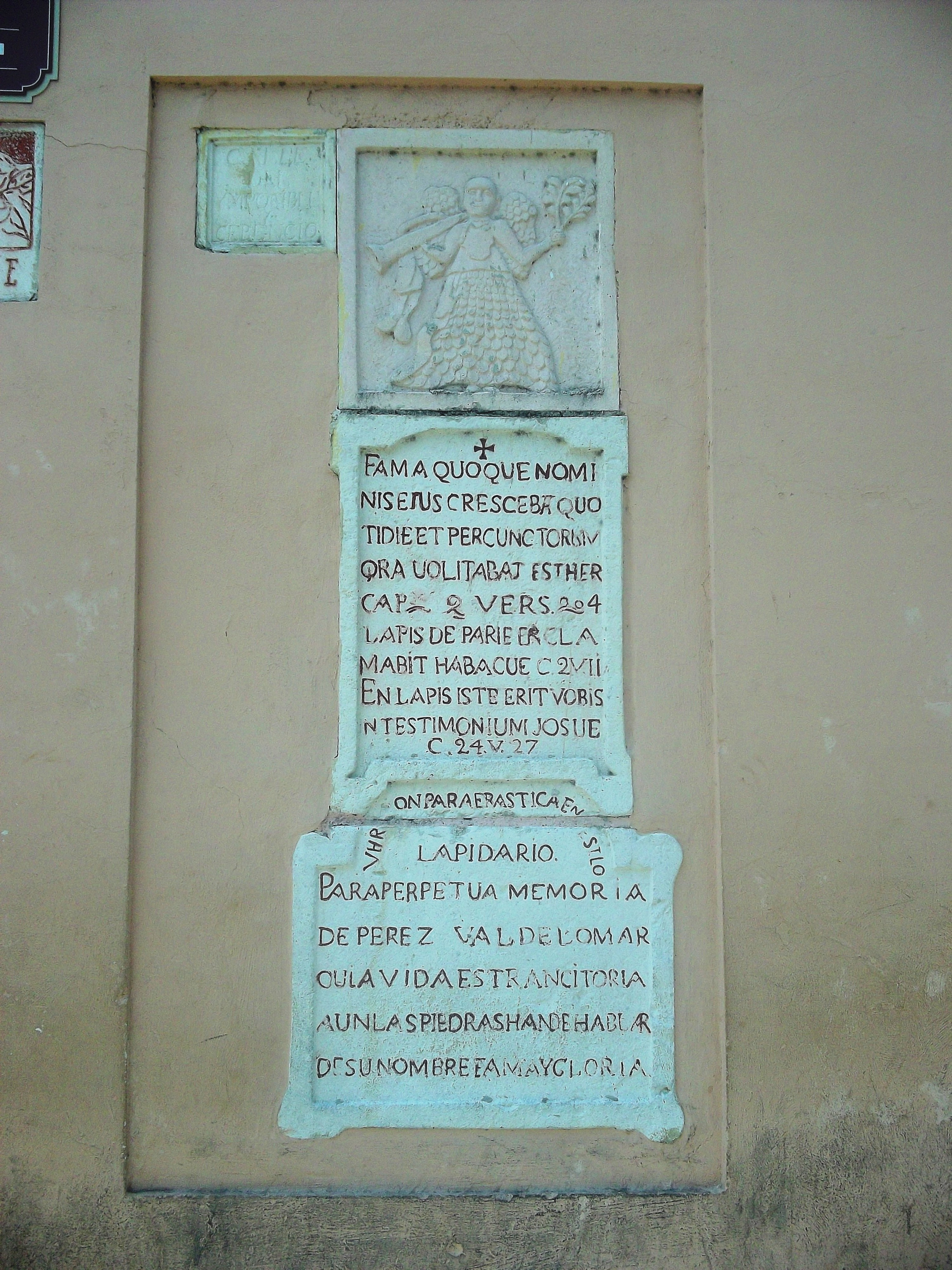 Placa que señala el sitio donde existió el cerro "El Imposible" el cual fue demolido por órdenes de Don Benito Pérez Valdelomar, entonces gobernador de Yucatán en 1800. Para conmemorar dicha proeza, se colocó esta placa conmemorativa. Consta de cuatro piezas: la de arriba ostenta la imagen de un ángel sosteniendo una trompeta y una rama, la de enmedio dice "FAMA QUOQUE NOMINIS EIUS CRESCEBAT QUOTIDIE ET PER CUNCTORUM ORA UOLIBAT ESTHER CAP.9 VERS.4 (su fama iba por todas las provincias, Ester 9:4) LAPIS DE PARIETE CLAMABIT HABACUC C.2 V.11 (la piedra clamará desde el muro, Habacuc 2:7) LAPIS ISTE ERIT VOBIS IN TESTIMONIUM IOSUE C.24 V.17 (he aquí esta piedra nos servirá de testigo, Josué 24:27)", la de abajo "VER[SI]ON PARAFRASTICA EN S[ANTISI]MO LAPIDARIO. PARA PERPETUA MEMORIA DE PEREZ VALEDOMAR QU[E] LA VIDA ES TRANCITORIA (transitoria) AUN LAS PIEDRAS HAN DE HABLAR DE SU NOMBRE FAMA Y GLORIA", a la izquierda del conjunto un bloque con la incripción "CALLE DEL IMPOCIBLE (imposible) Y CE (se) BENCIO (venció)".